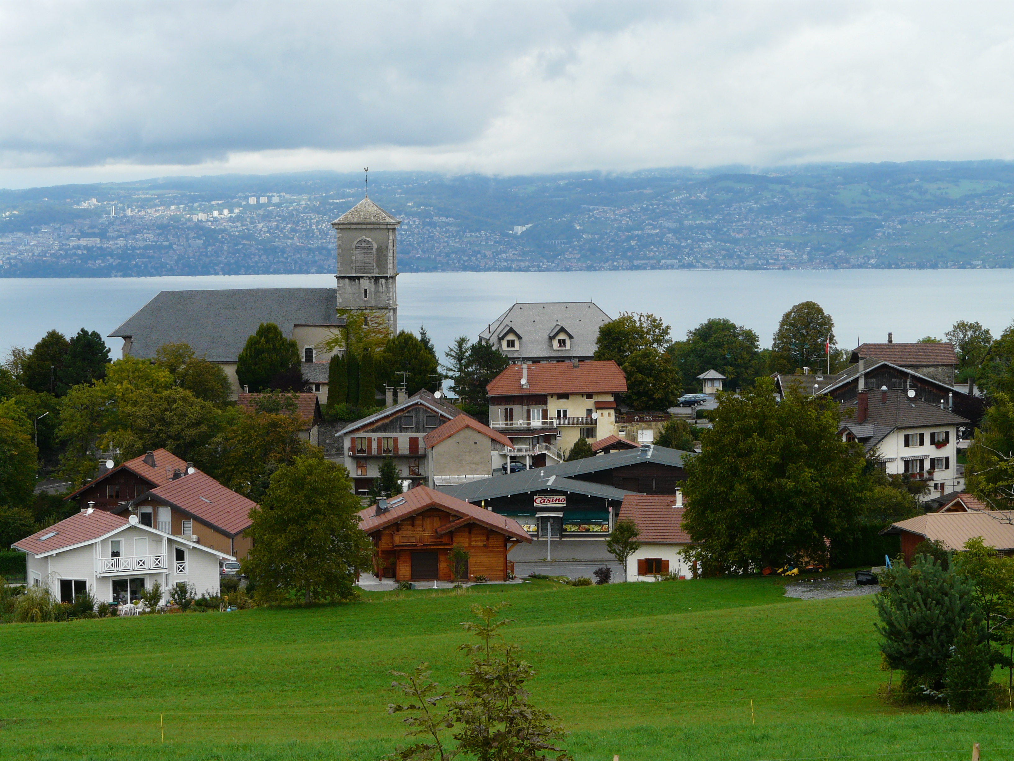 Saint-Paul-en-Chablais: vue générale du chef-lieu (église, mairie) avec en arrière-plan le lac Léman et la "riviéra vaudoise"